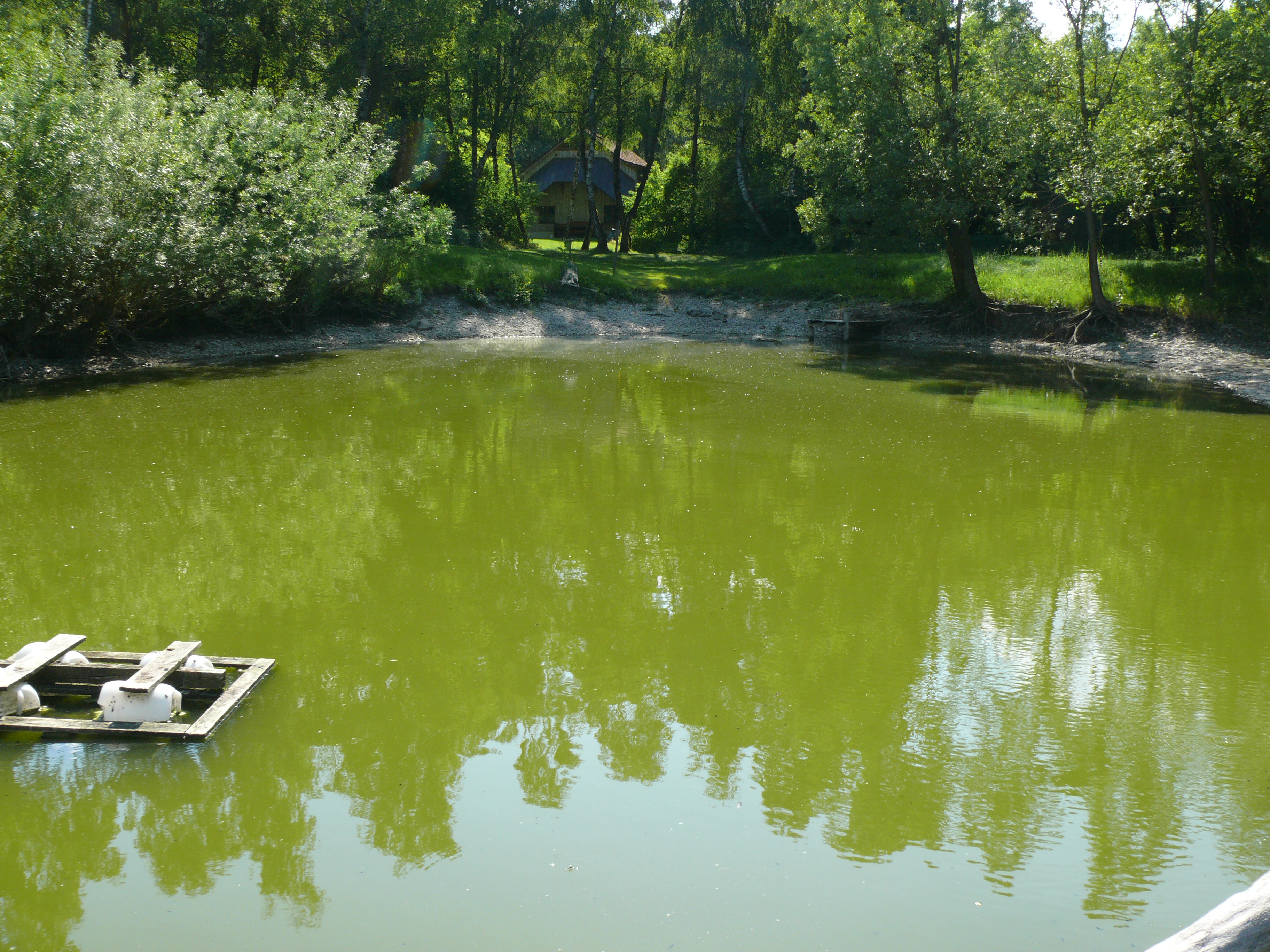 Tümpel im Südosten des Zengermooses mit Forst- und Jagdhütte im Hintergrund, Landkreis Erding, Bayern, Deutschland